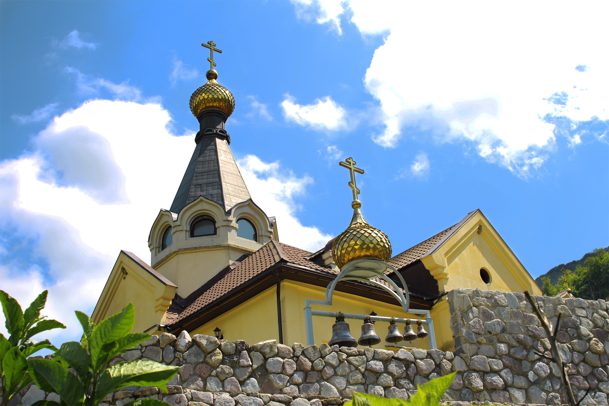 На фото изображен монастырь "Крестовая пустынь". Монастырь расположен в поселке Нижний Солох-Аул под городом Сочи, в живописных предгорьях Кавказа, в верховьях реки Шахе. Проект монастырского комплекса разработал сочинский архитектор Борис Бабаков.